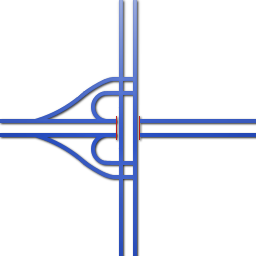 Een schema van een halfklaverbladaansluiting, gemaakt door mezelf.